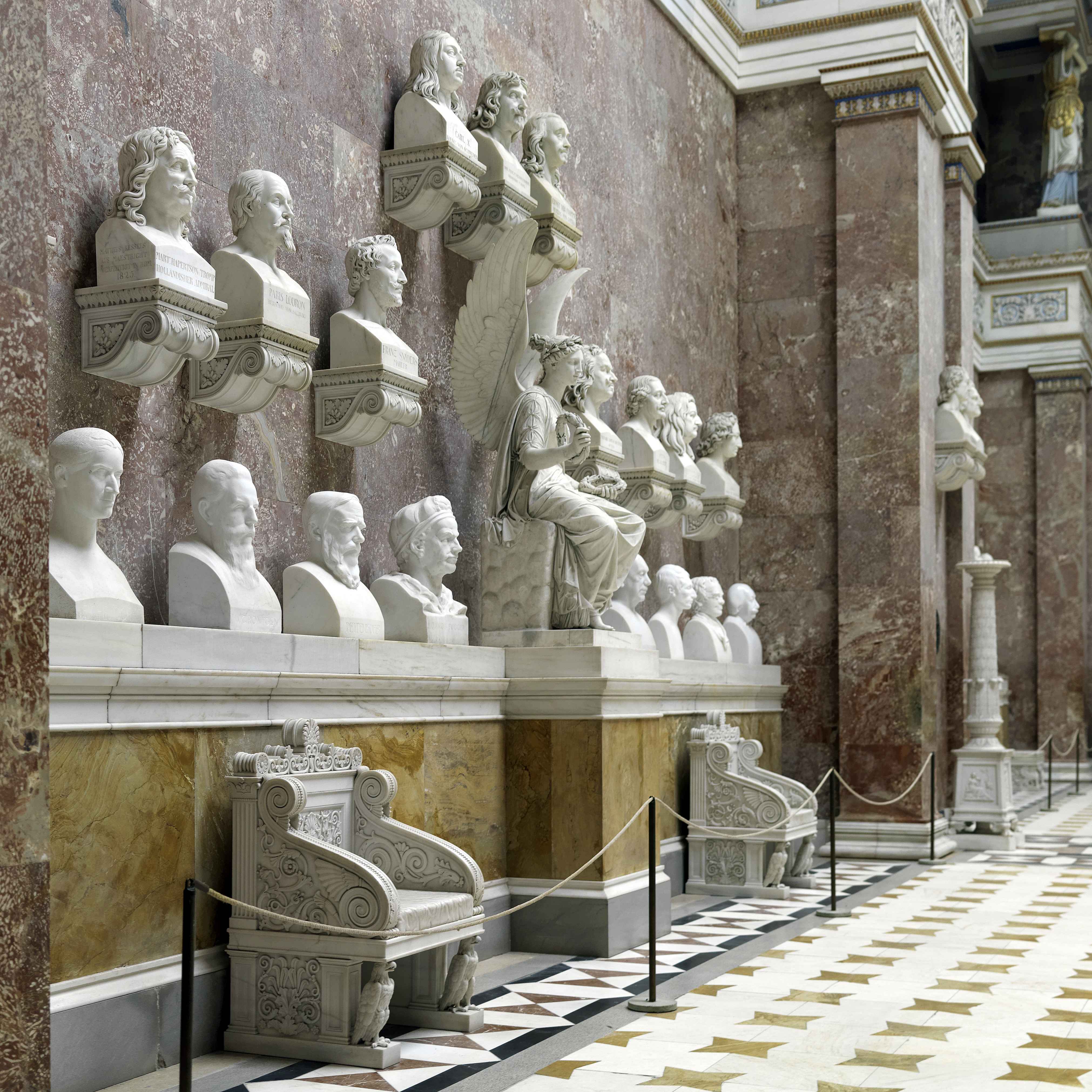 Die Gedenkstätte Walhalla Ruhmes- und Ehrenhalle an der Donau, Innenansicht